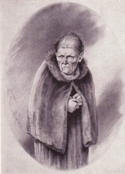 Процентщица. "Преступление и наказание". Иллюстрация П. М. Боклевского. 1880-е годы